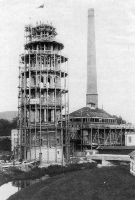 Vratislavice nad Nisou, Továrna na koberce Ignaz Ginzkey & Co. ve Vratislavicích nad Nisou. Stavba zauhlovací a vodárenské věže.